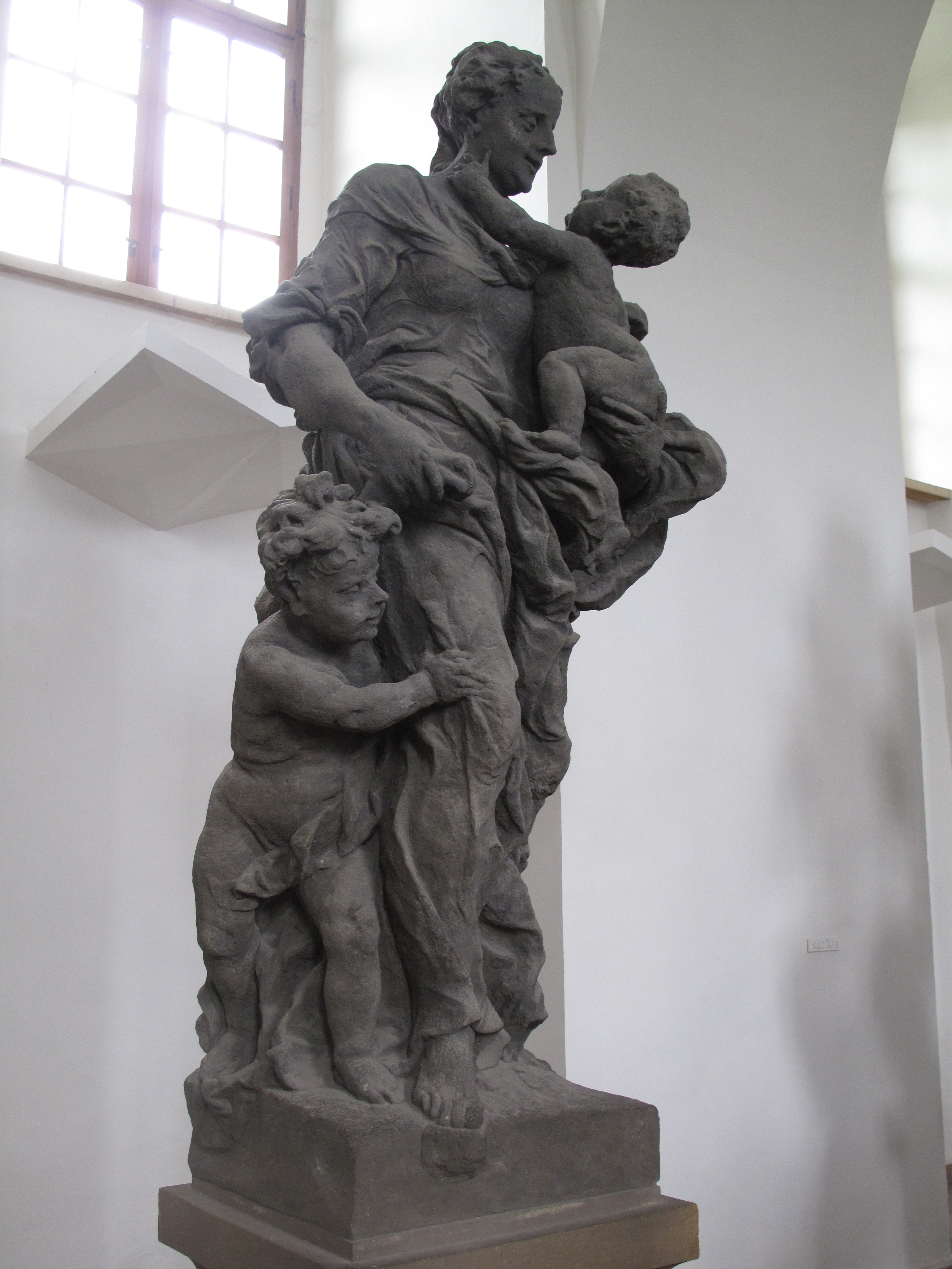 Matyáš Bernard Braun, Láska (Ctnosti) - originál lapidárium Kuks